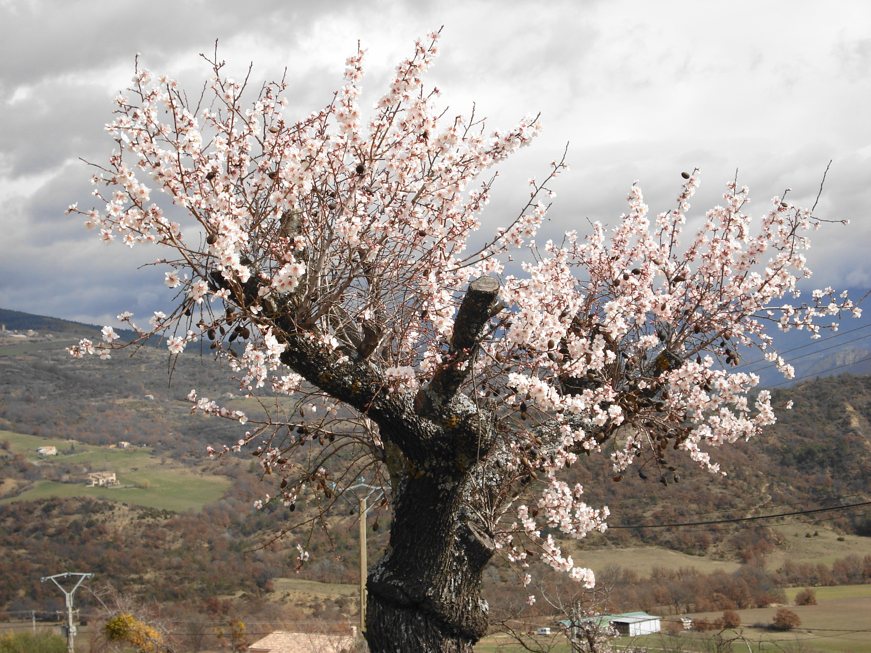 Photographie d'un arbre fleuri Prunus amygdalus (amandier)